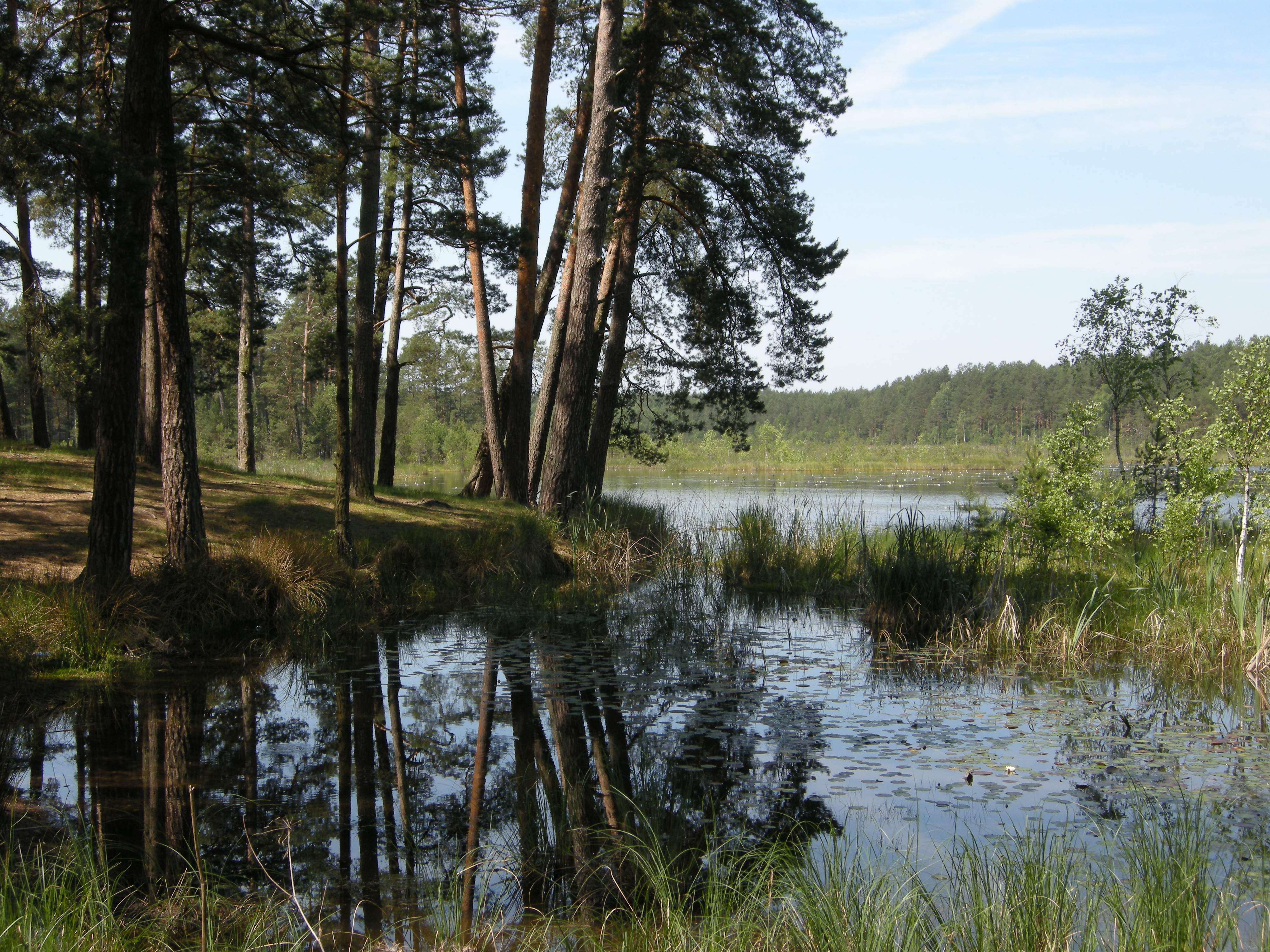 Святе озеро на Заславщині.